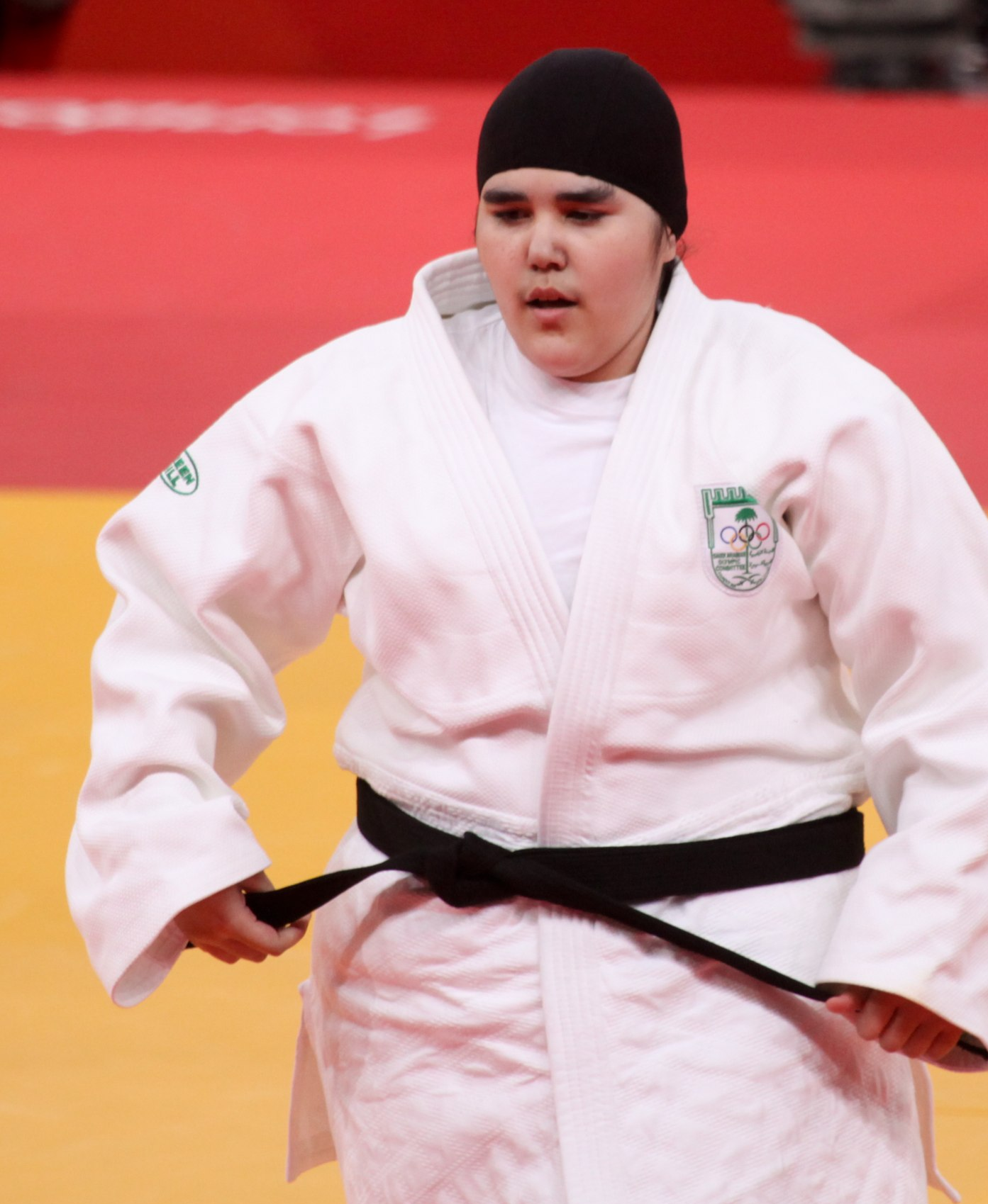 Saudi Arabian judoka, Wojdan Shaherkani at the 2012 London Olympics